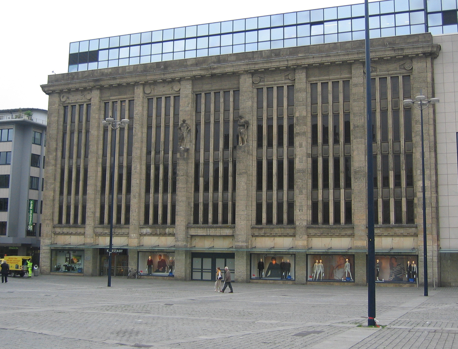 Südfassade Kaufhaus Karstadt früher Althoff Dortmund Eigene Aufnahme August 2006